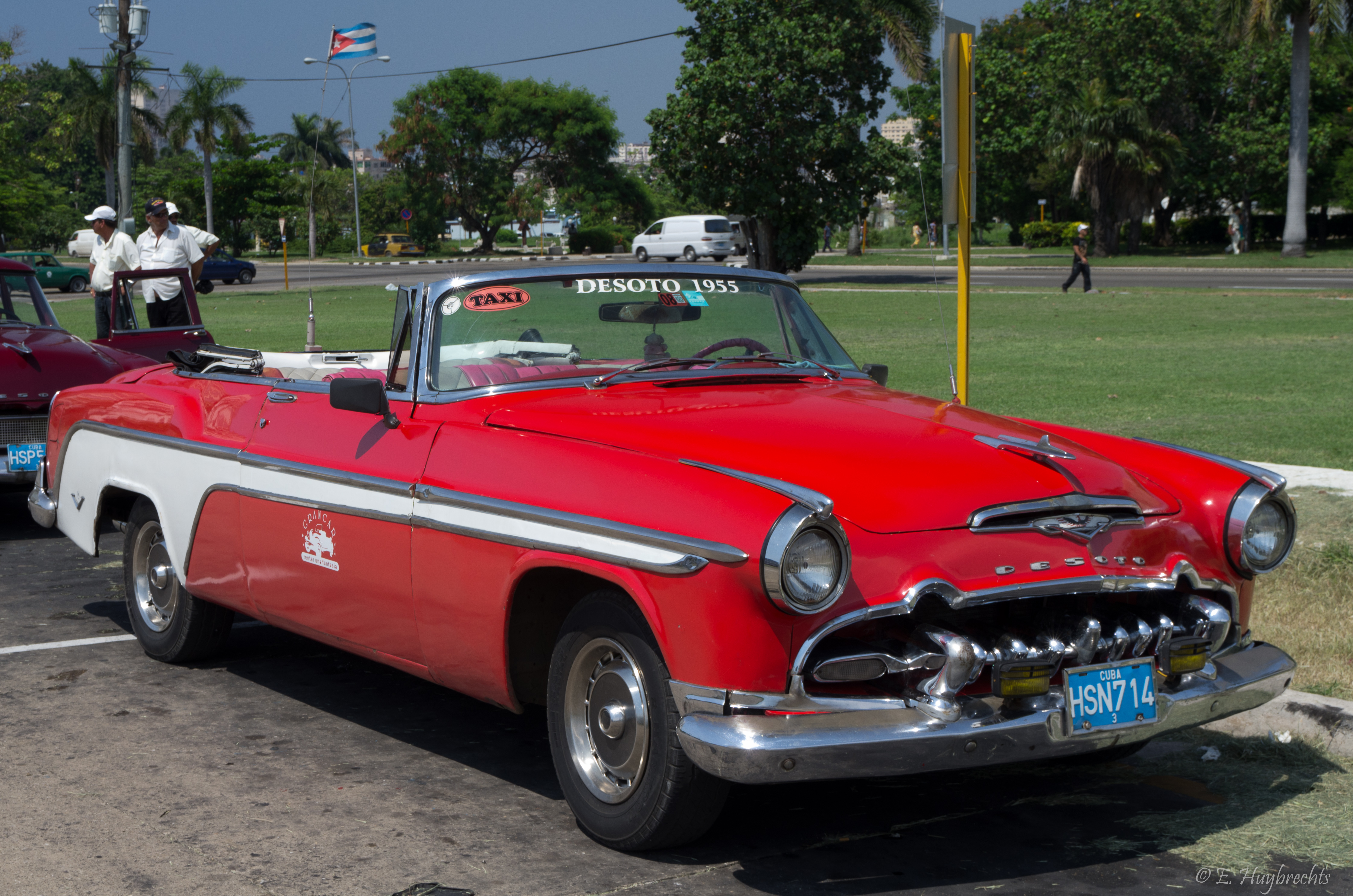 20 juillet 2011 (K5_02374)